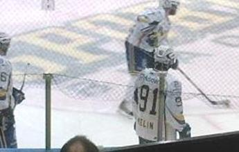 Björn Melin i HV71 under uppvärmningen inför den femte finalmatchen i SM-slutspelet 2009 i Karlstad mot Färjestads BK. Färjestads BK vann matchen med 3-2 och blev svenska mästare.